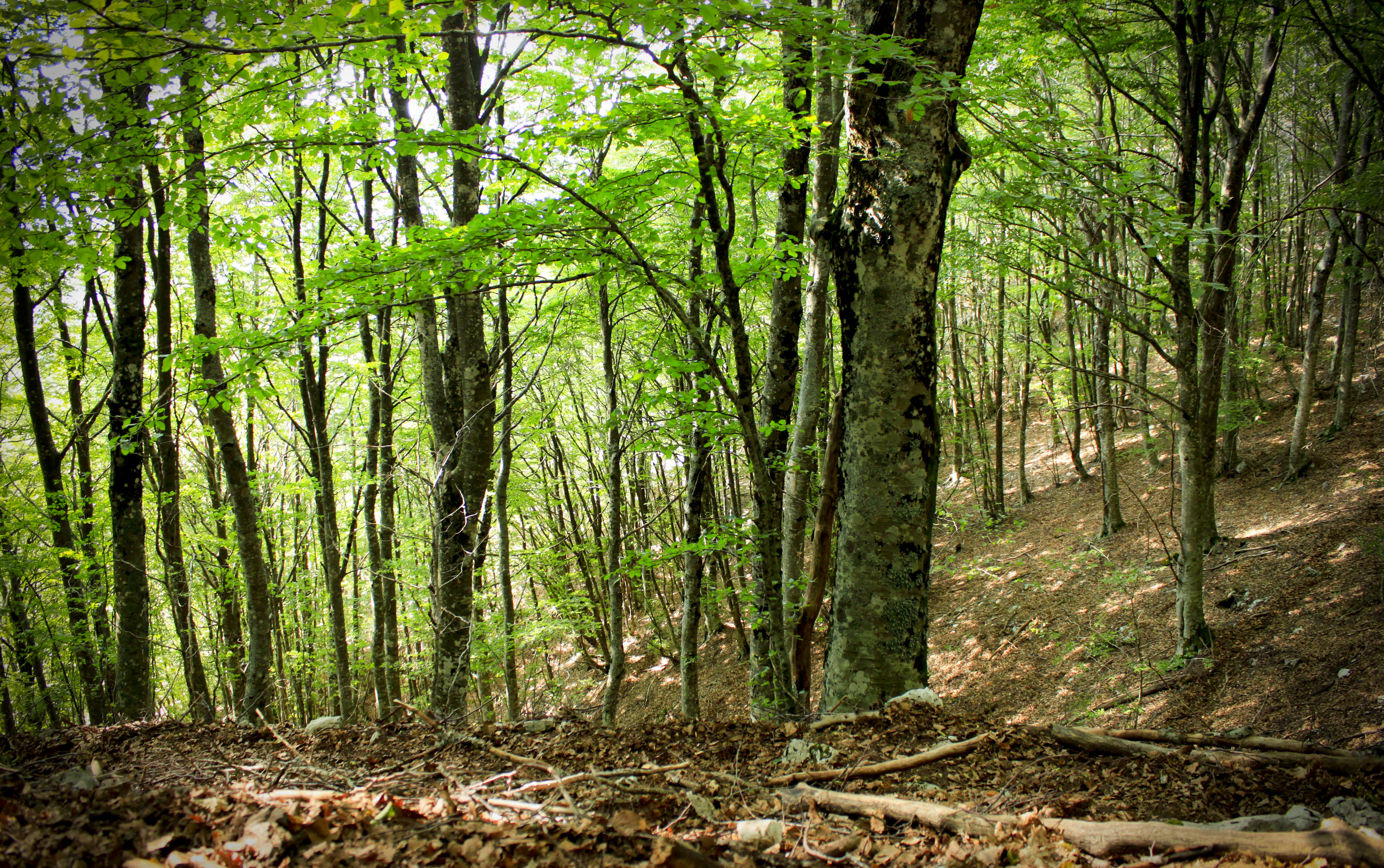 Fotografia di Gabriele Altimari